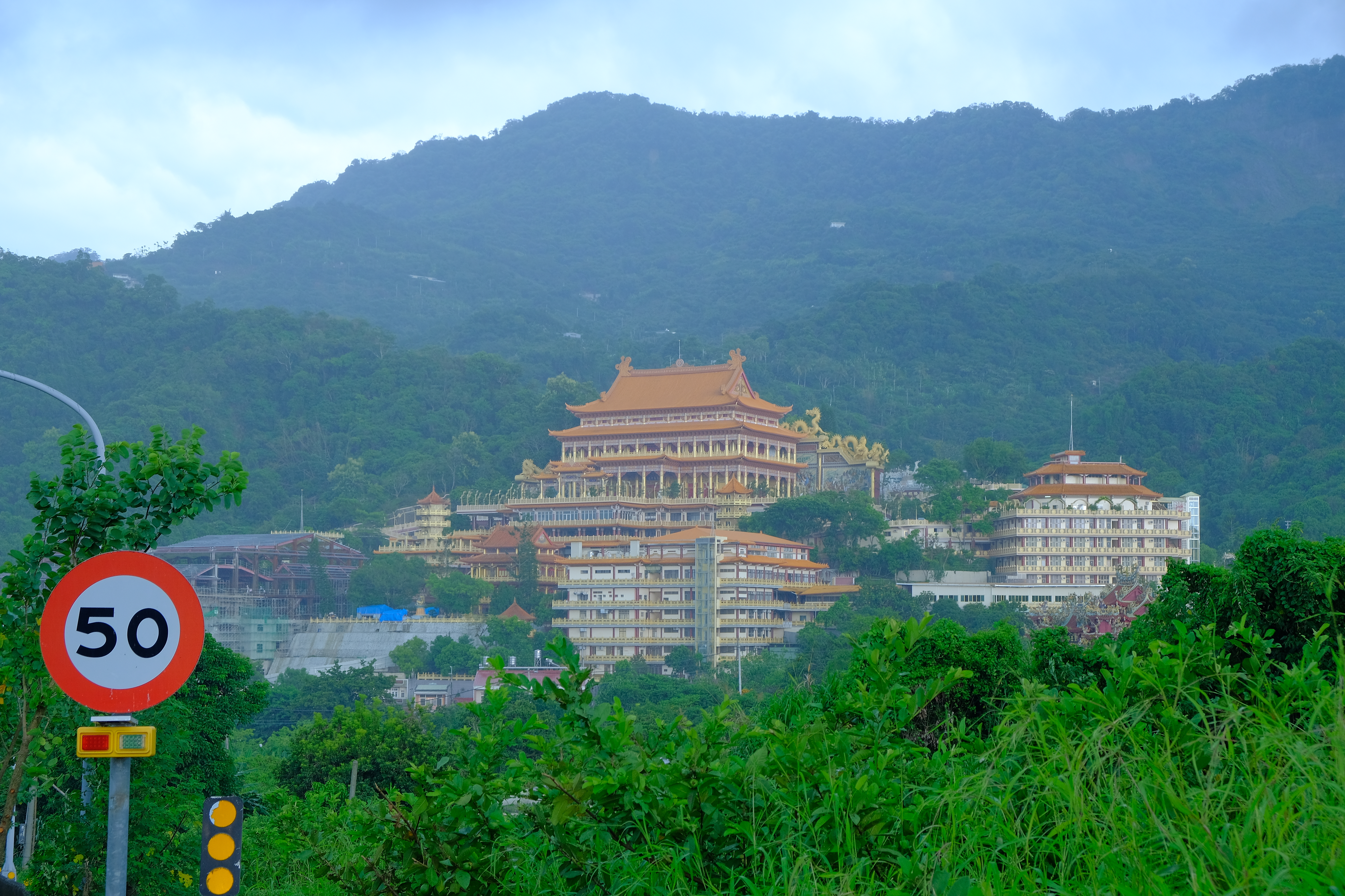 2019 一貫道玉山寶光聖堂 Yiguandao Yushan Baoguang Temple